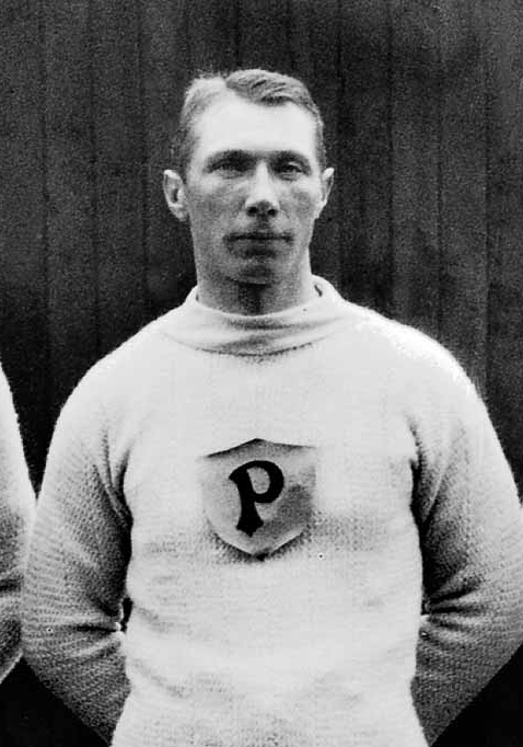 Herbert Lindström, 1912 Olympics